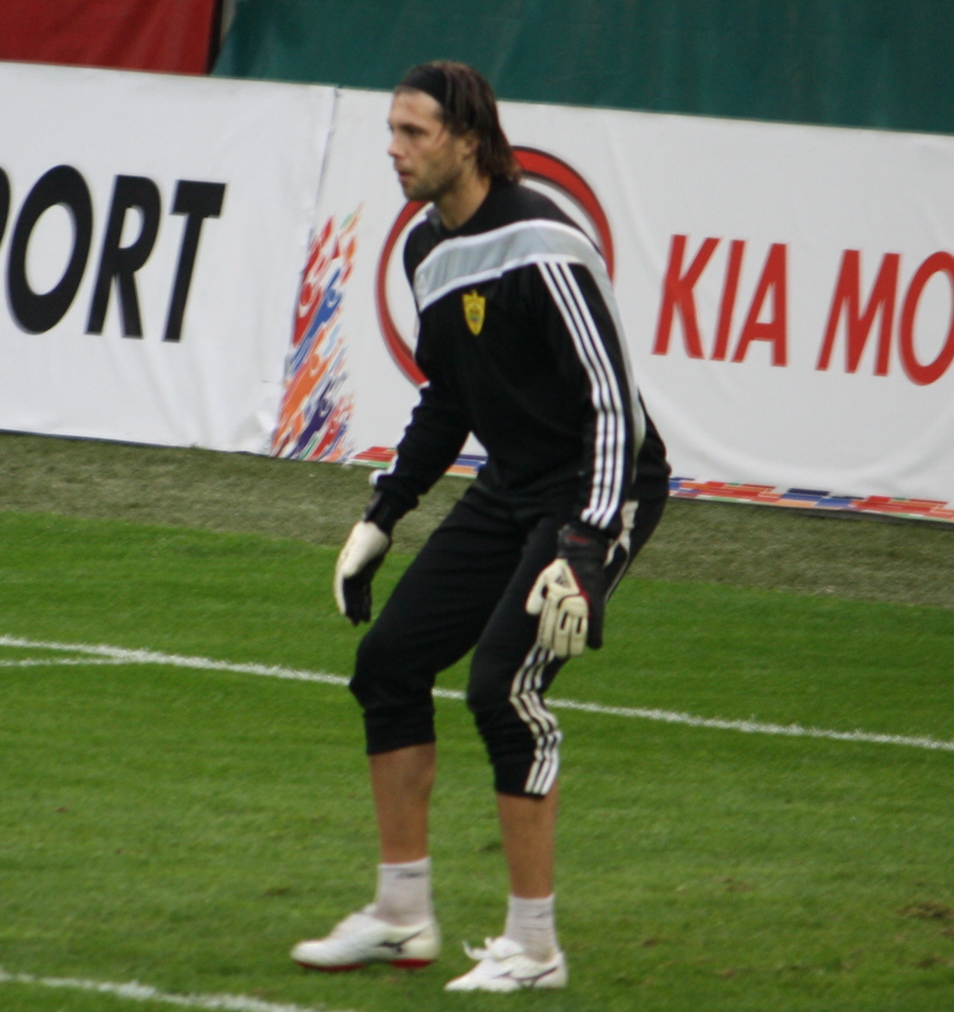 Ilya Abayev